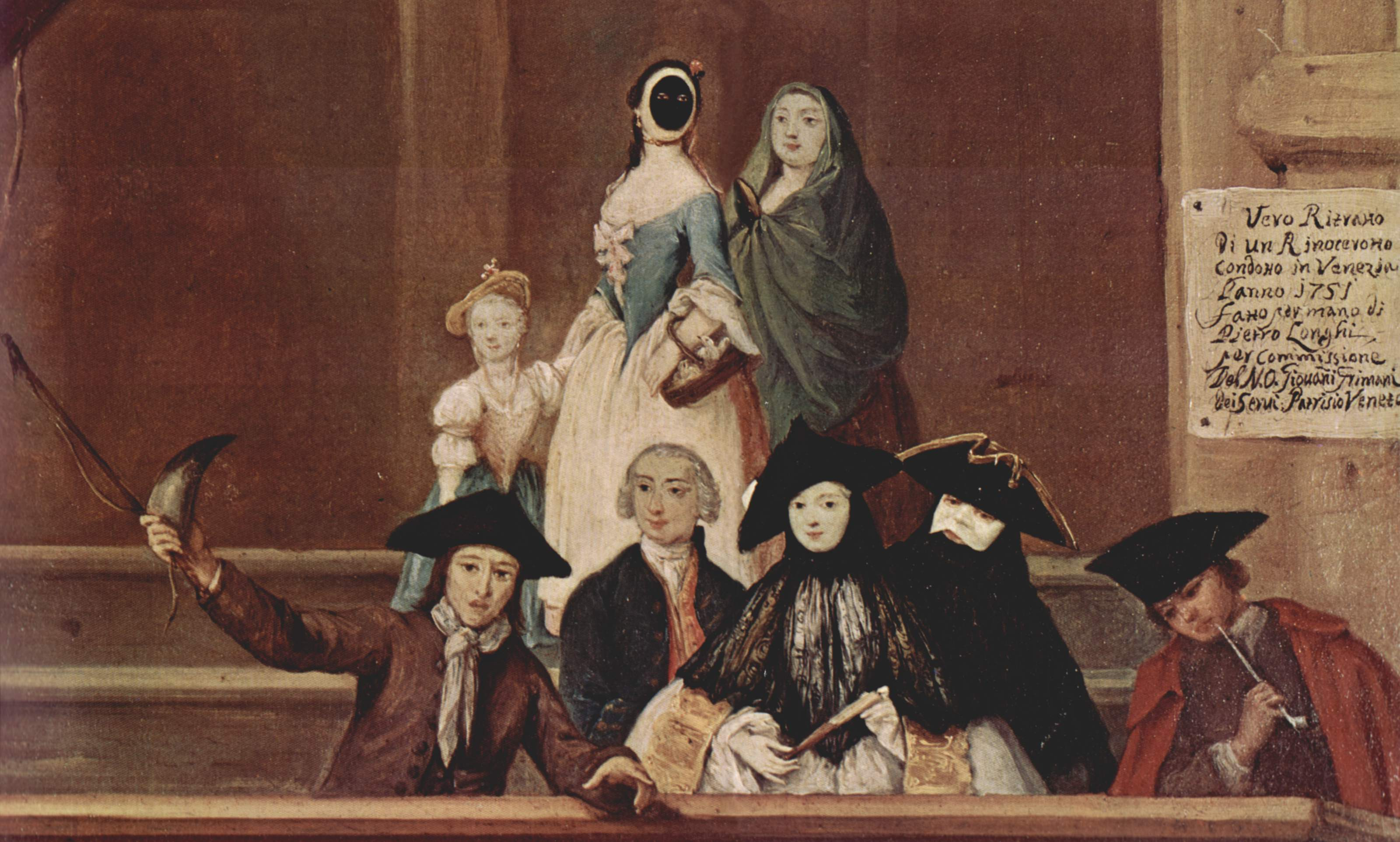 detail